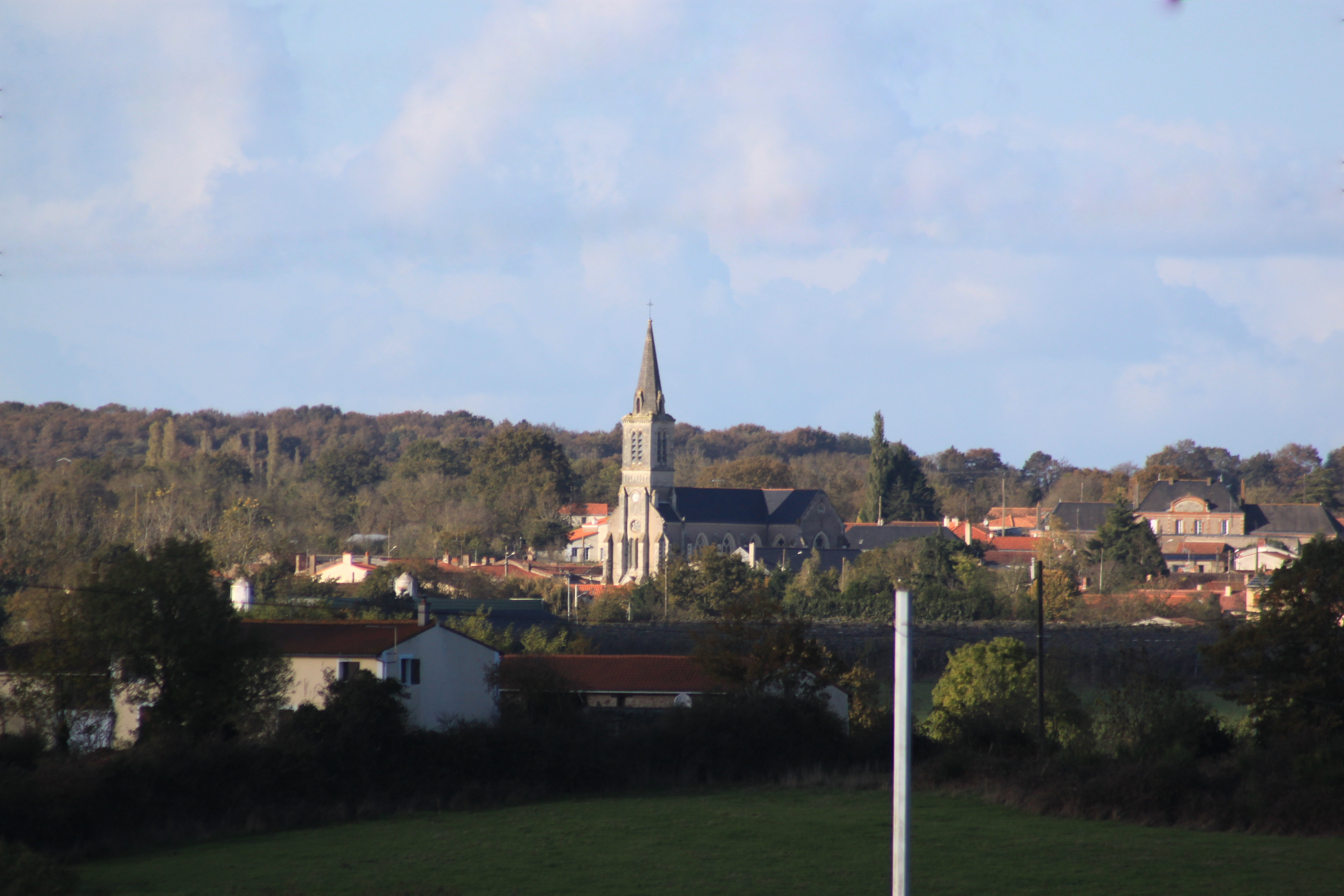 Église Saint-Symphorien, XIX°, Fr-49-la Boissière-sur-Èvre.